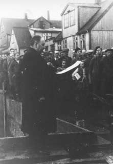 Føroyskt: Thorstein Petersen heldur røðu, tá grundarsteinurin til nýggja bygningin hjá Sjóvinnubankanum í Niels Finsensgøtu verður lagdur fyrst í fimtiárunum.